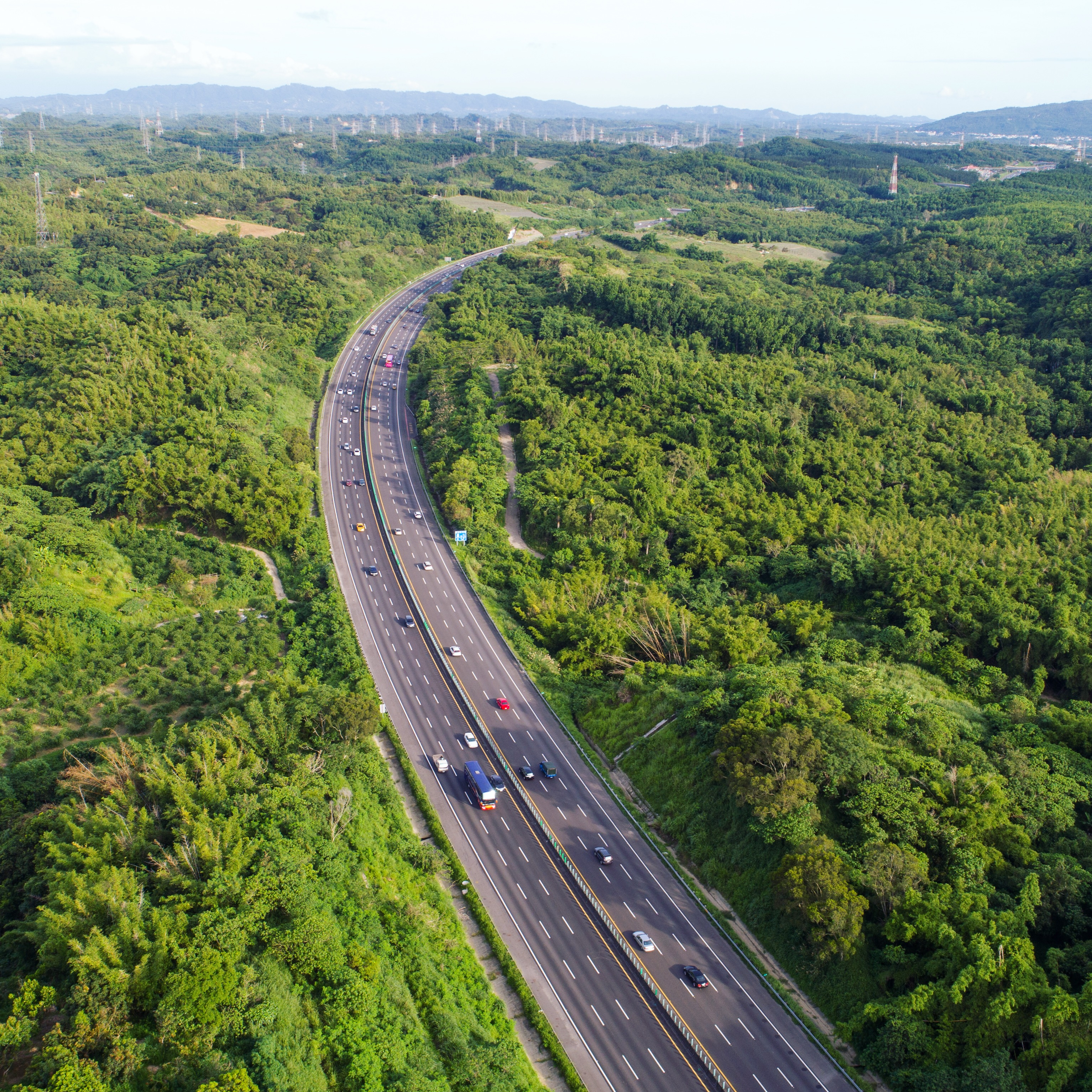 位於關廟區大潭埤附近的福爾摩沙高速公路 ( 此為裁圖，非直接公路路段上空拍攝 )